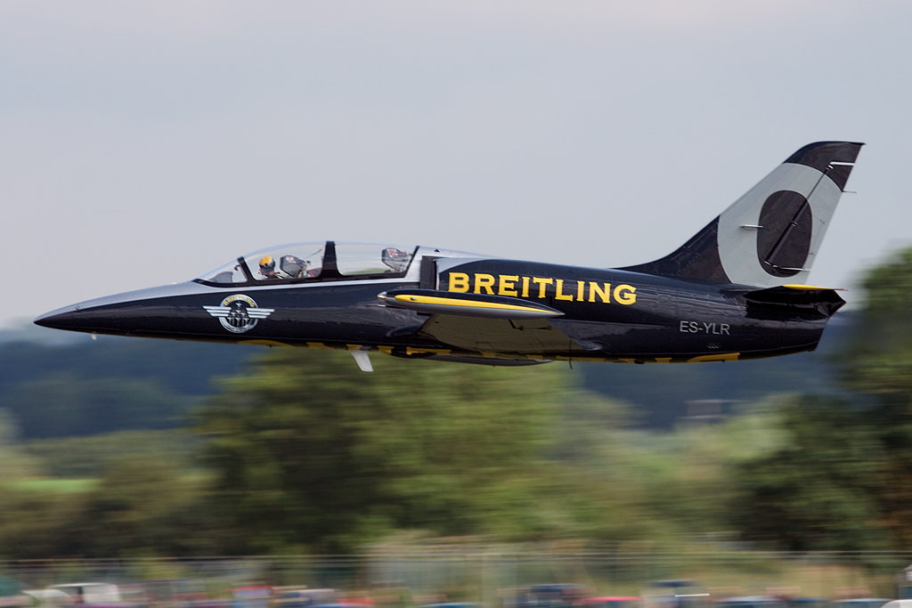 ESYLR